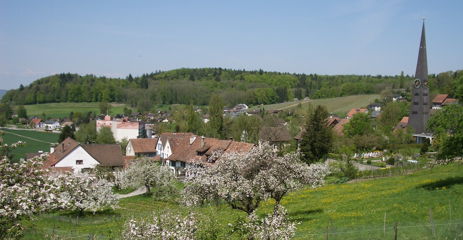 Trüllikon ZH, Switzerland